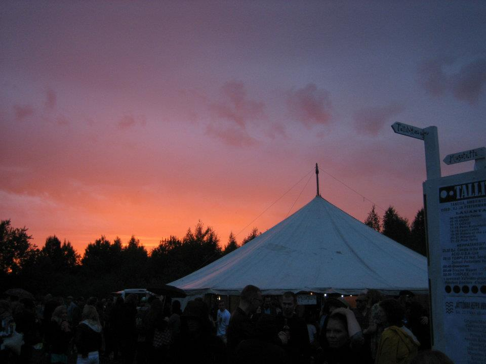 Jättömaan Iso Lava illalla